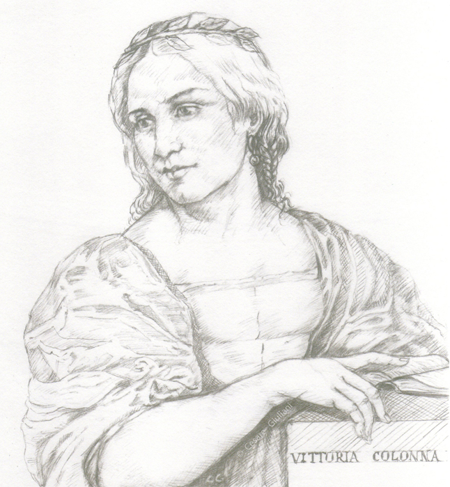 Disegno alla poetessa Vittoria Colonna.